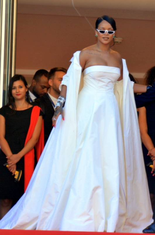 Rihanna au festival de Cannes